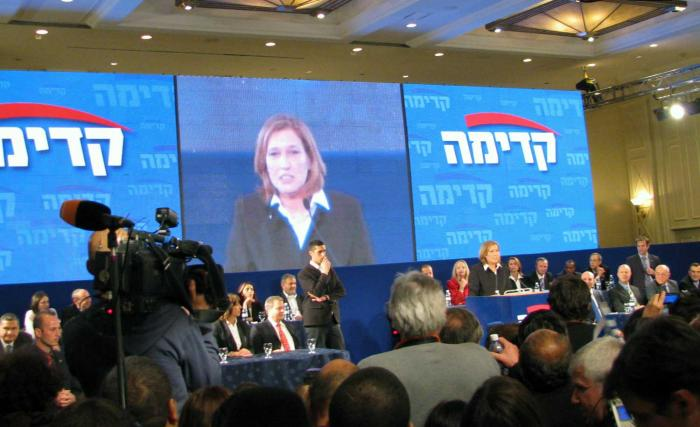 ערב בחירות 2009, מטה קדימה